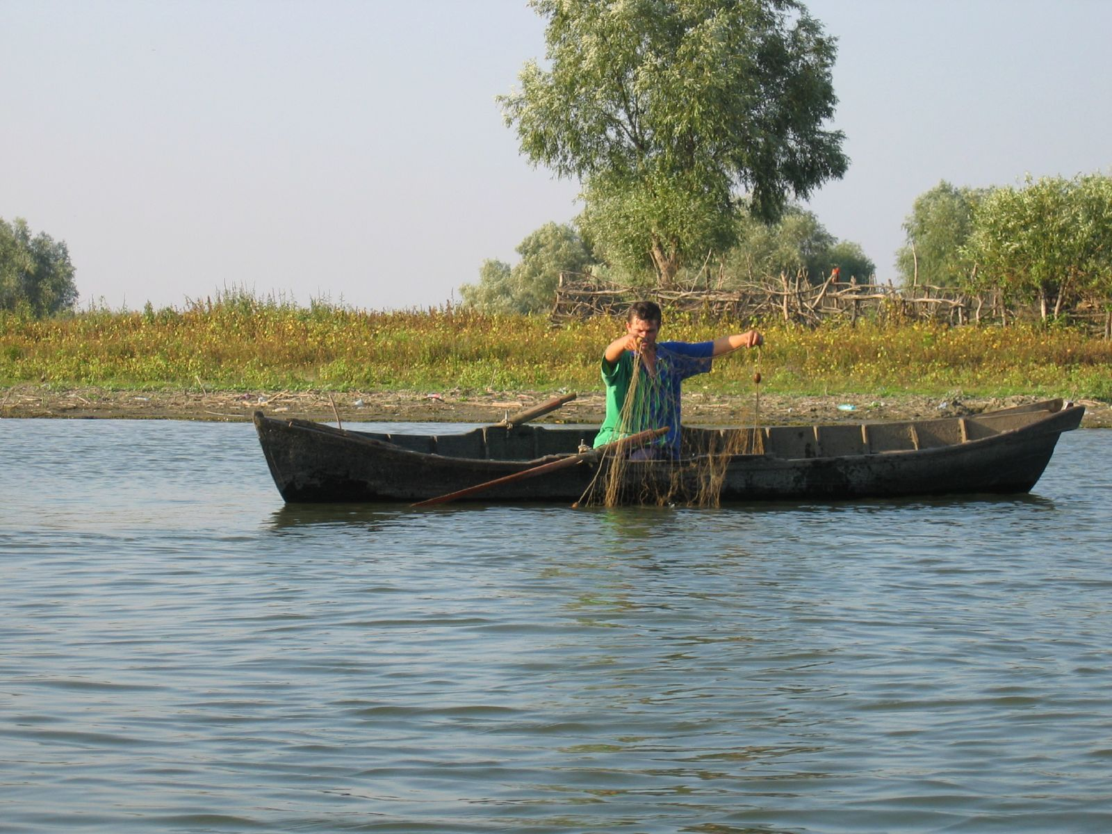 Visser in de Sulina-arm.